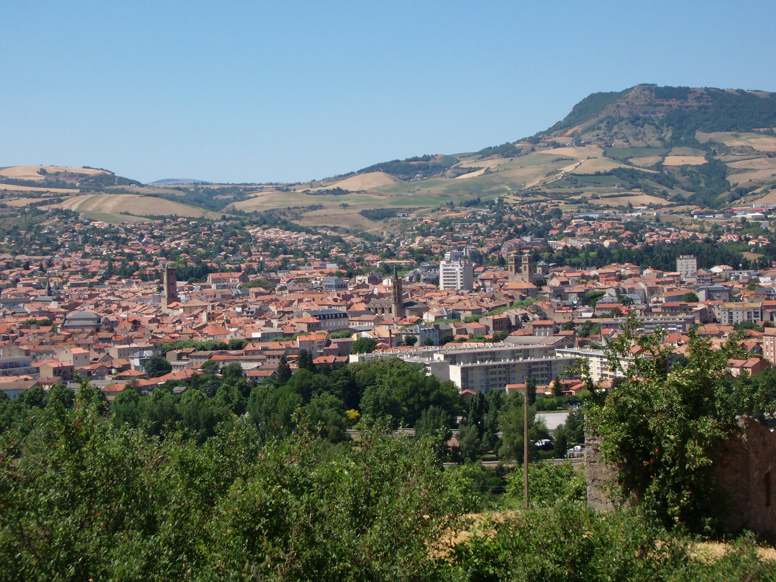 View on Millau